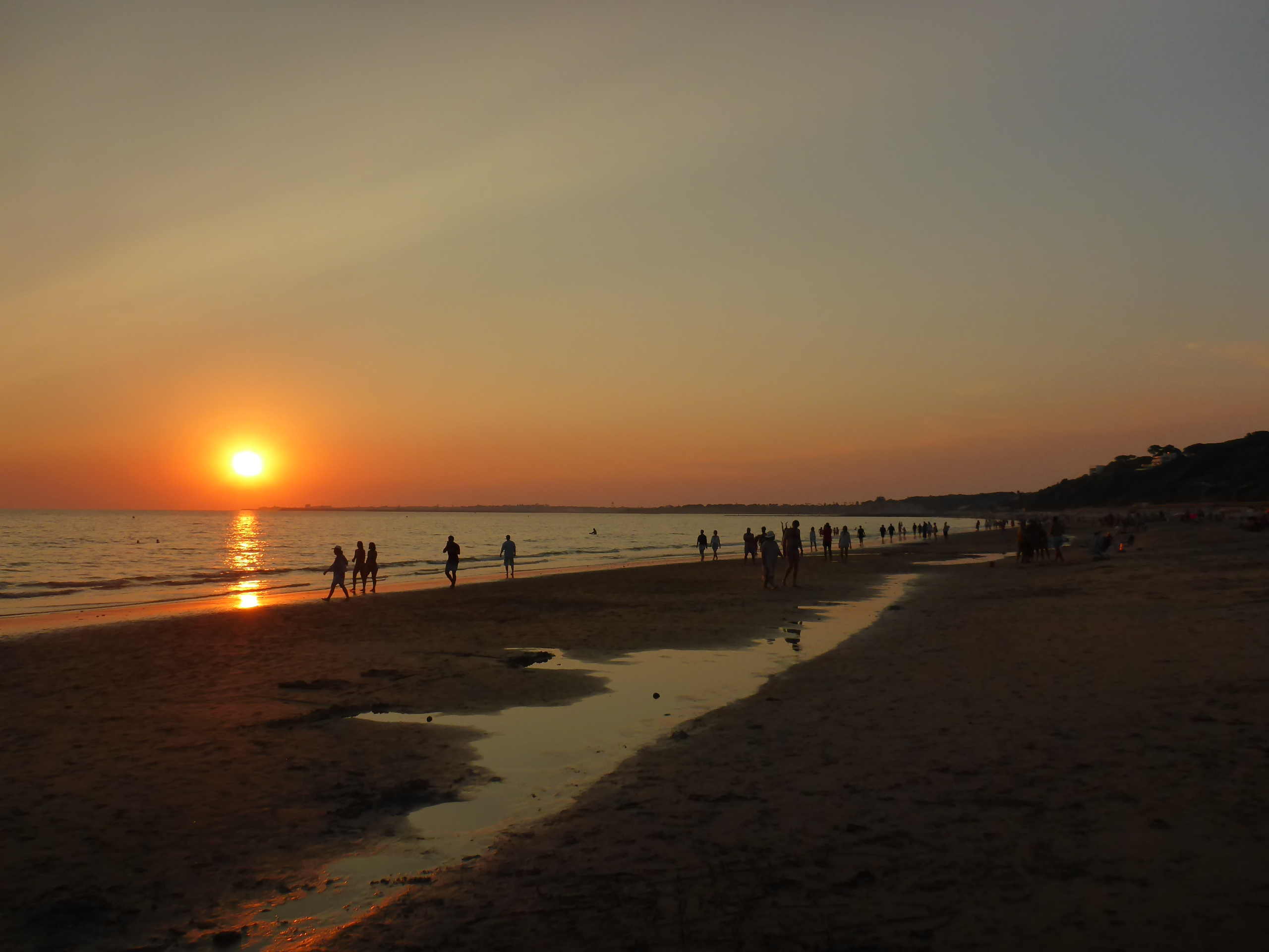 Playa de las Redes - El Puerto de Santa María (España)